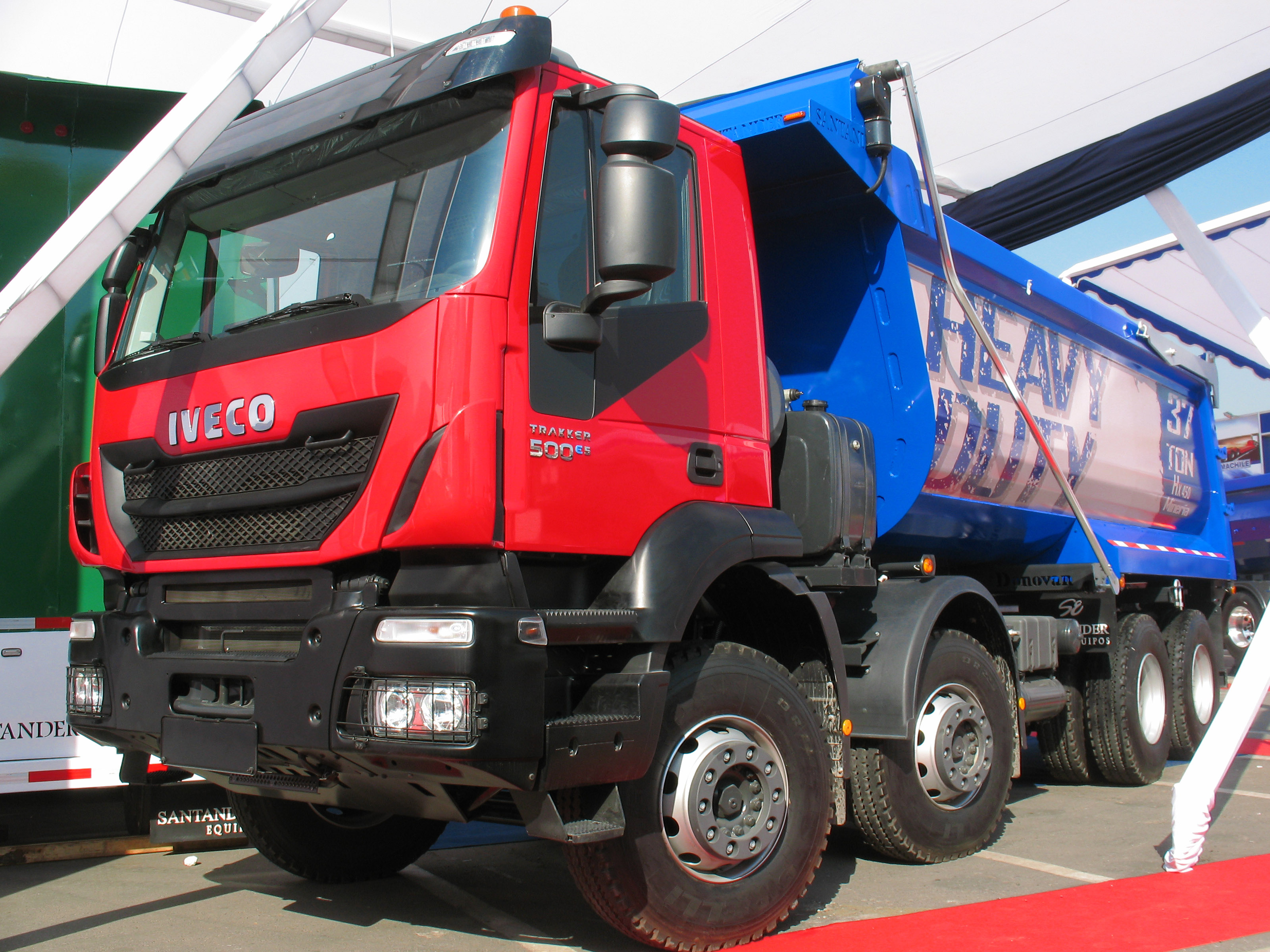 Iveco Trakker 500 e5 8x4 2014